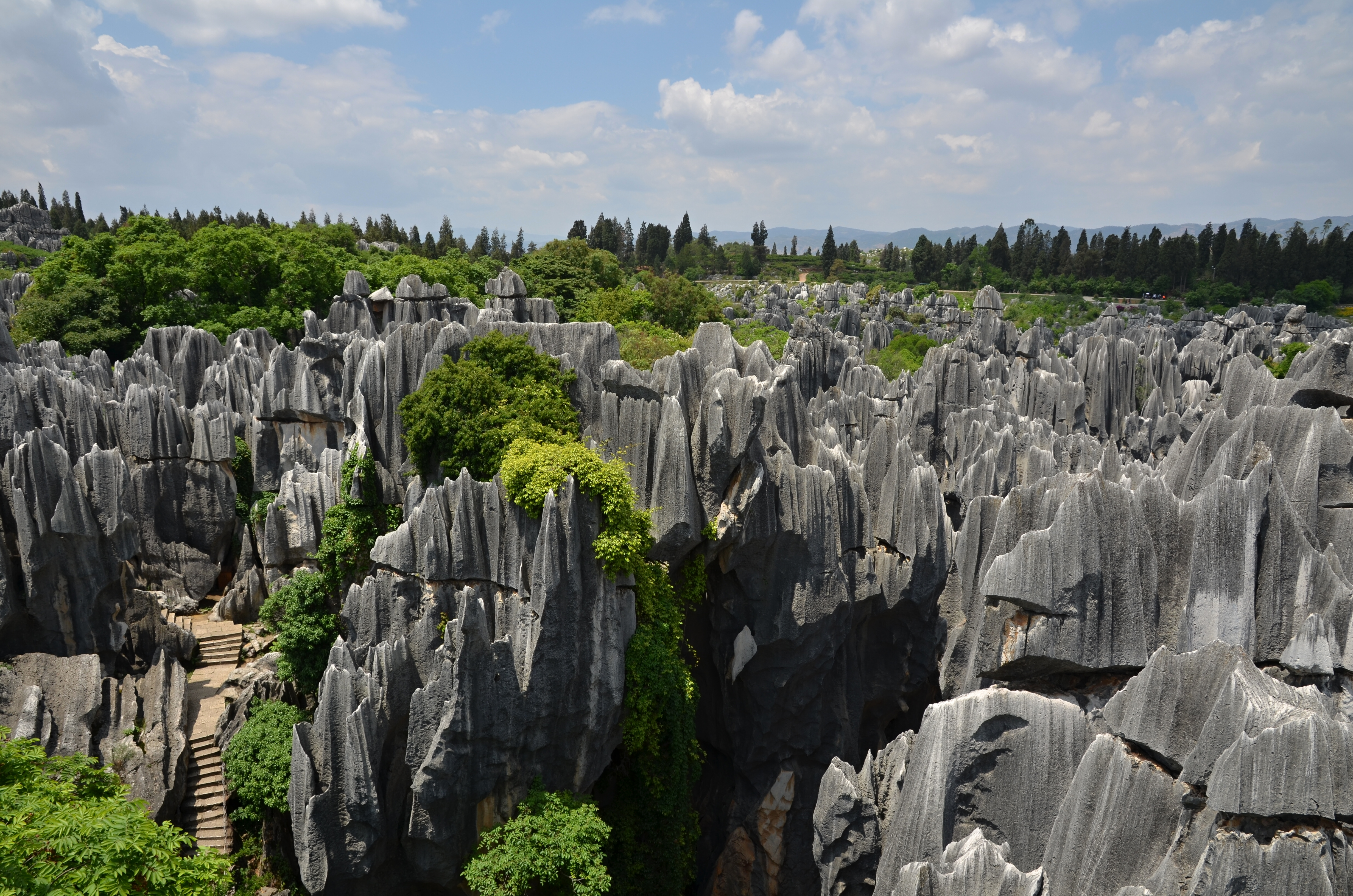 Shilin - Kamenný les